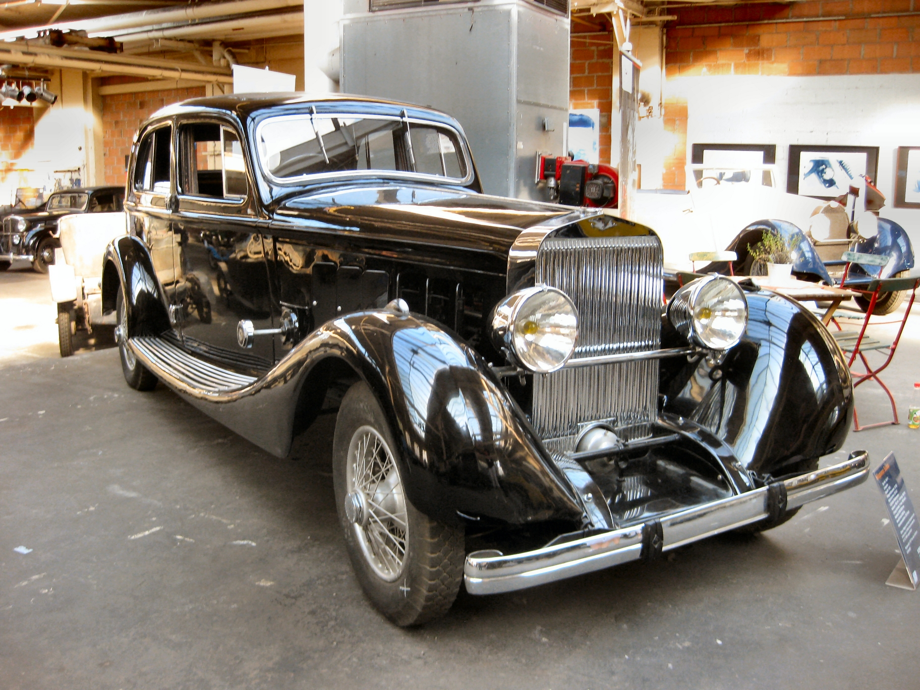 Hispano Suiza H.6C Berline Letourneur & Marchand aus Sammlung Schlumpf